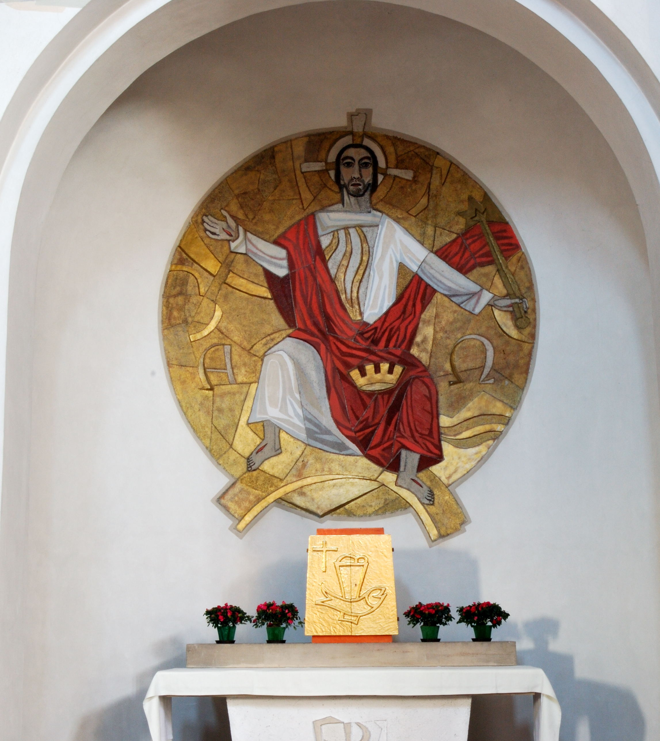 Christkönigsaltar im linken Seitenschiff